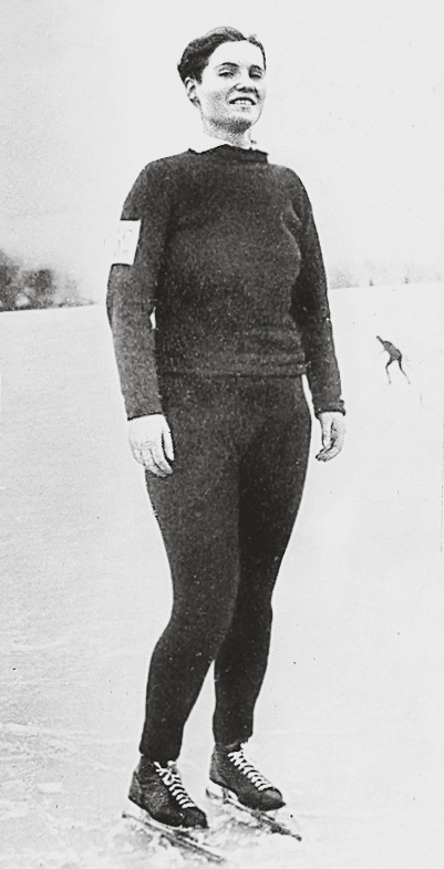 Zoya Mironova